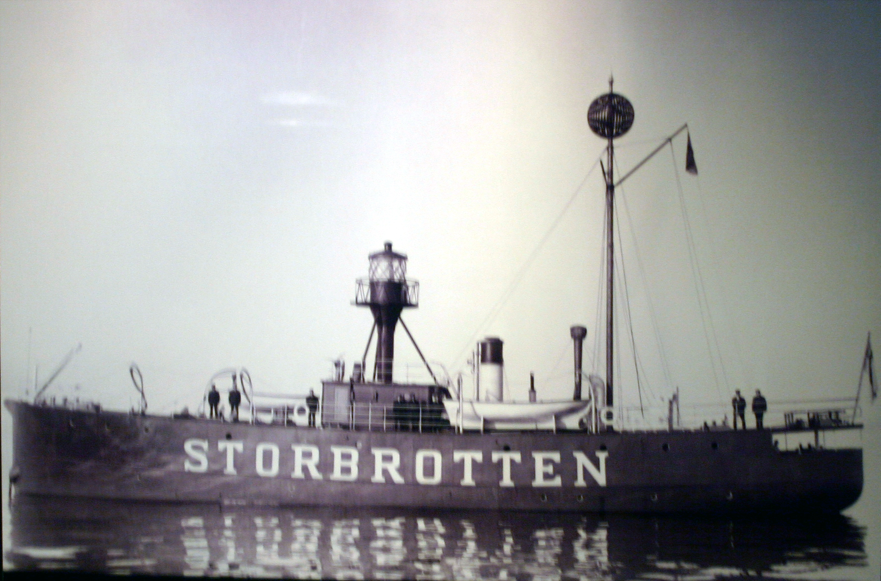 Toinen majakkalaiva Storbrotten